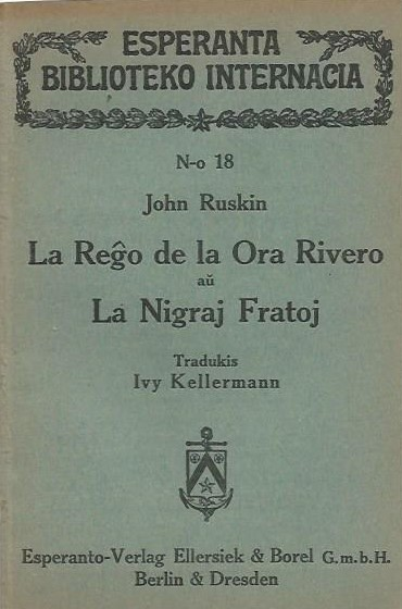 La Regho de la Ora Rivero aux La Nigraj Fratoj